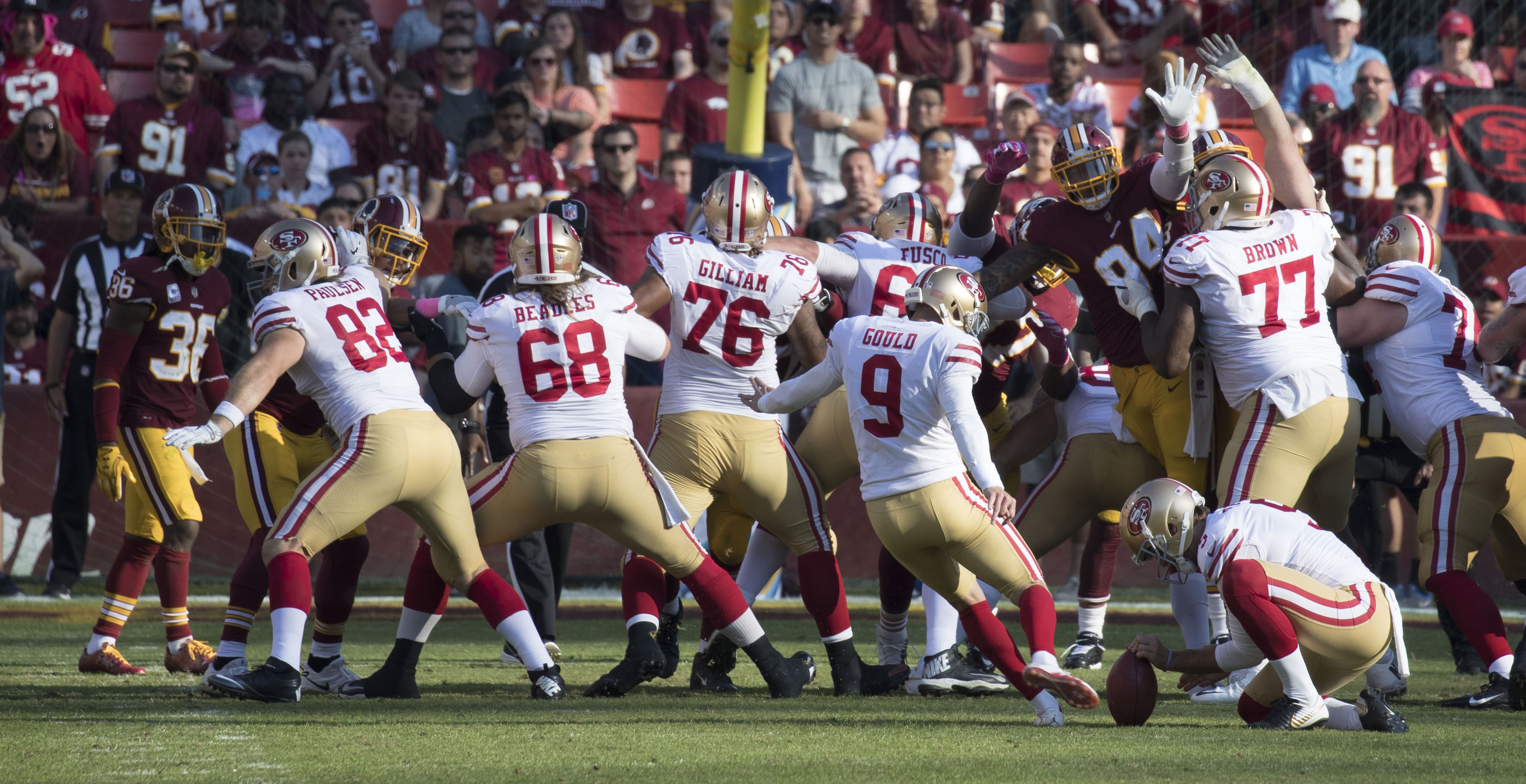 49ers at Redskins 10/15/17